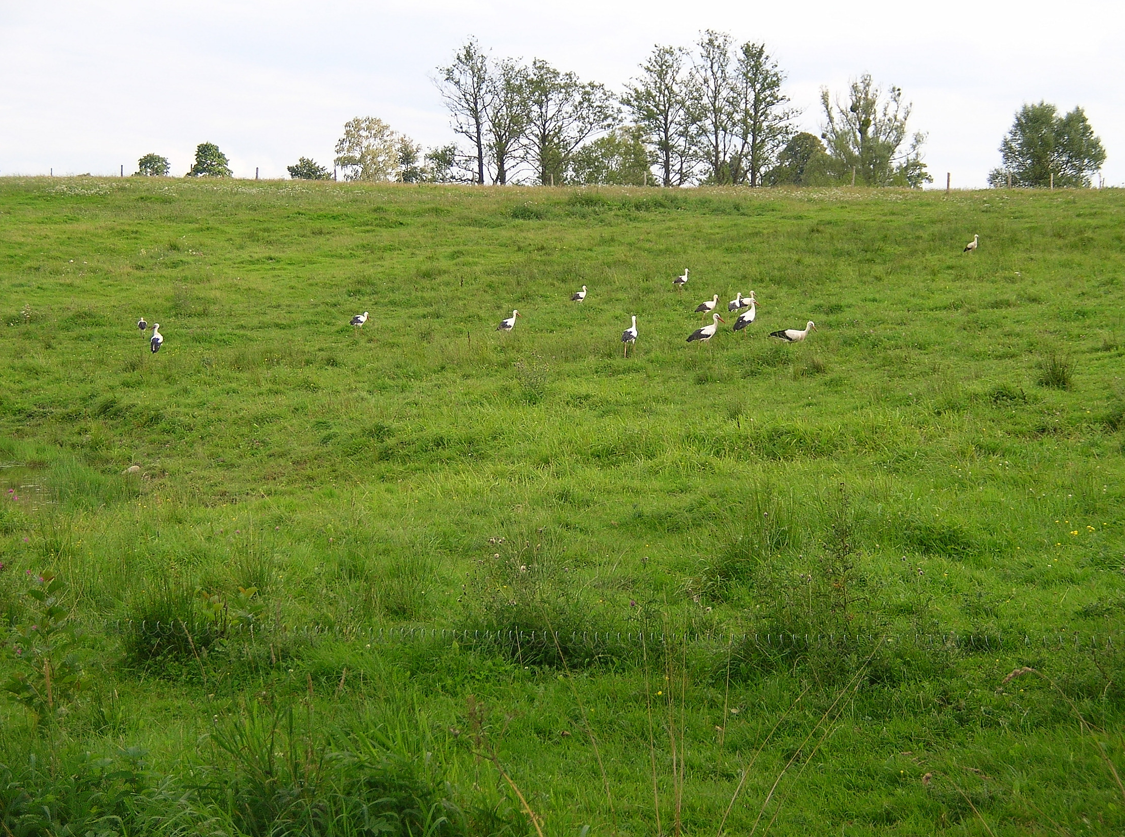 Bociany białe na łące we wsi Żywkowo (woj. warmińsko-mazurskie)